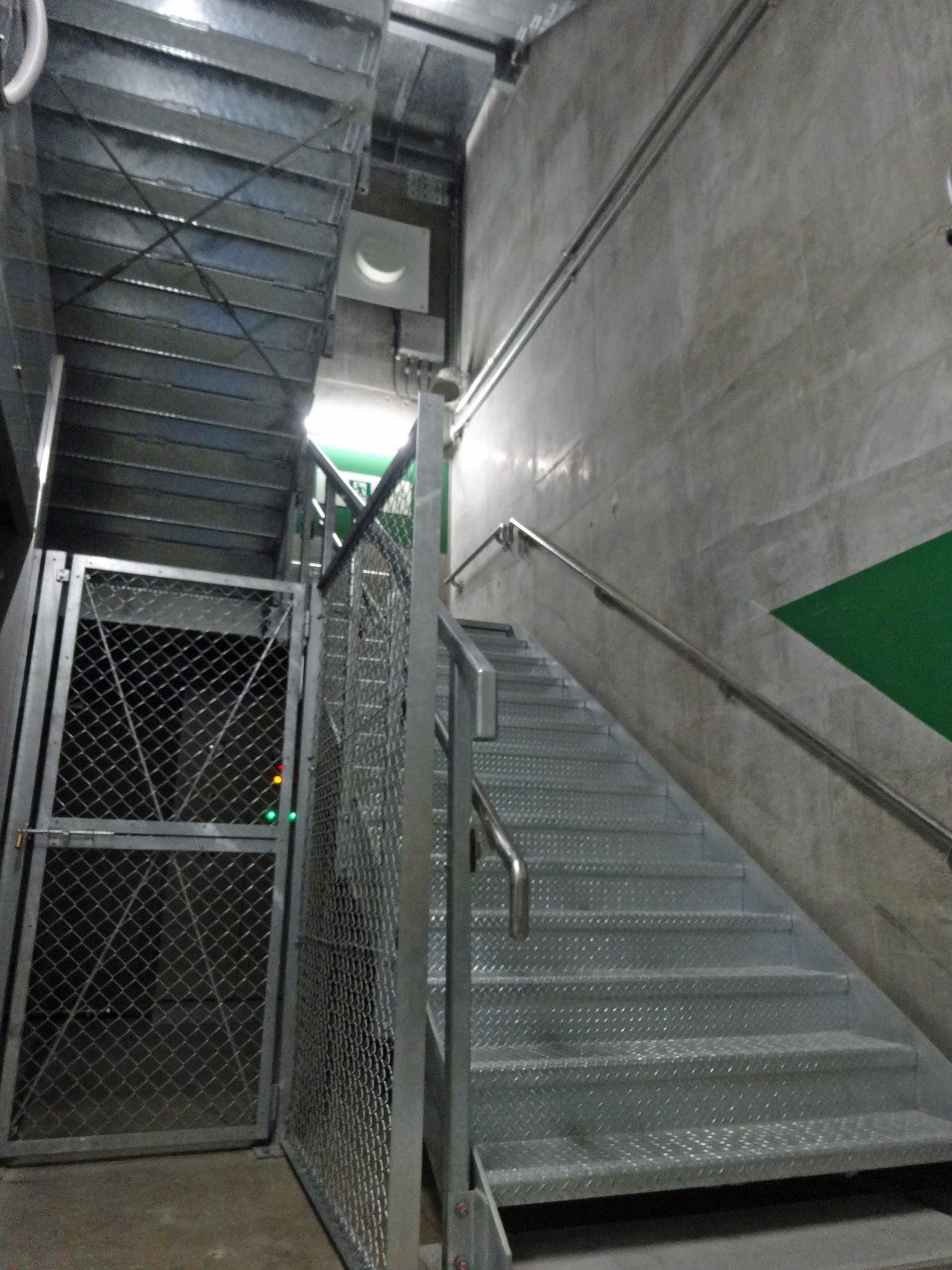 首都高速中央環状線（山手トンネル）五反田出入口付近にある地上への非常通路 開通前見学ツアーで撮影